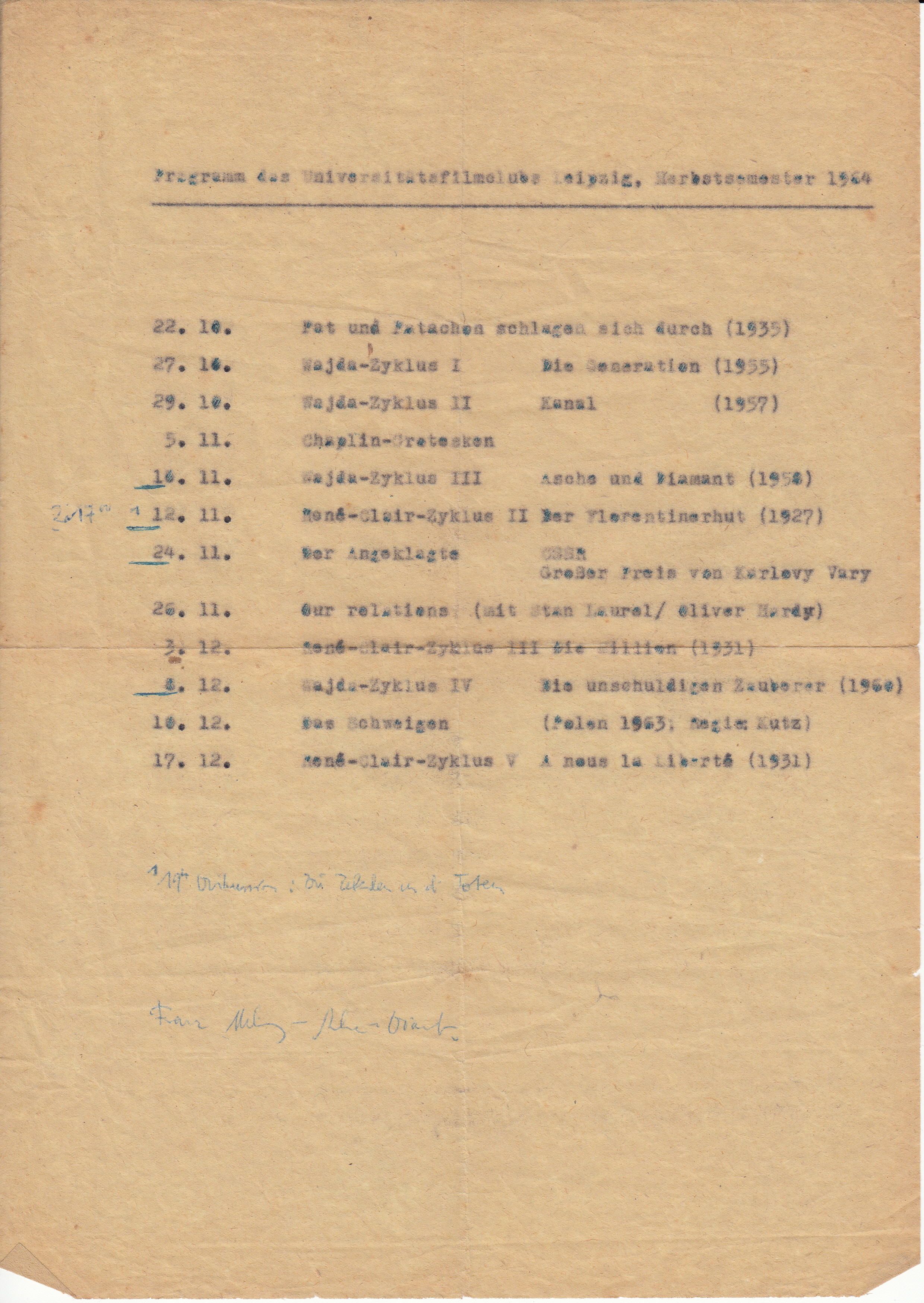 Programm des Universitätsfilmclubs Leipzig von 1964